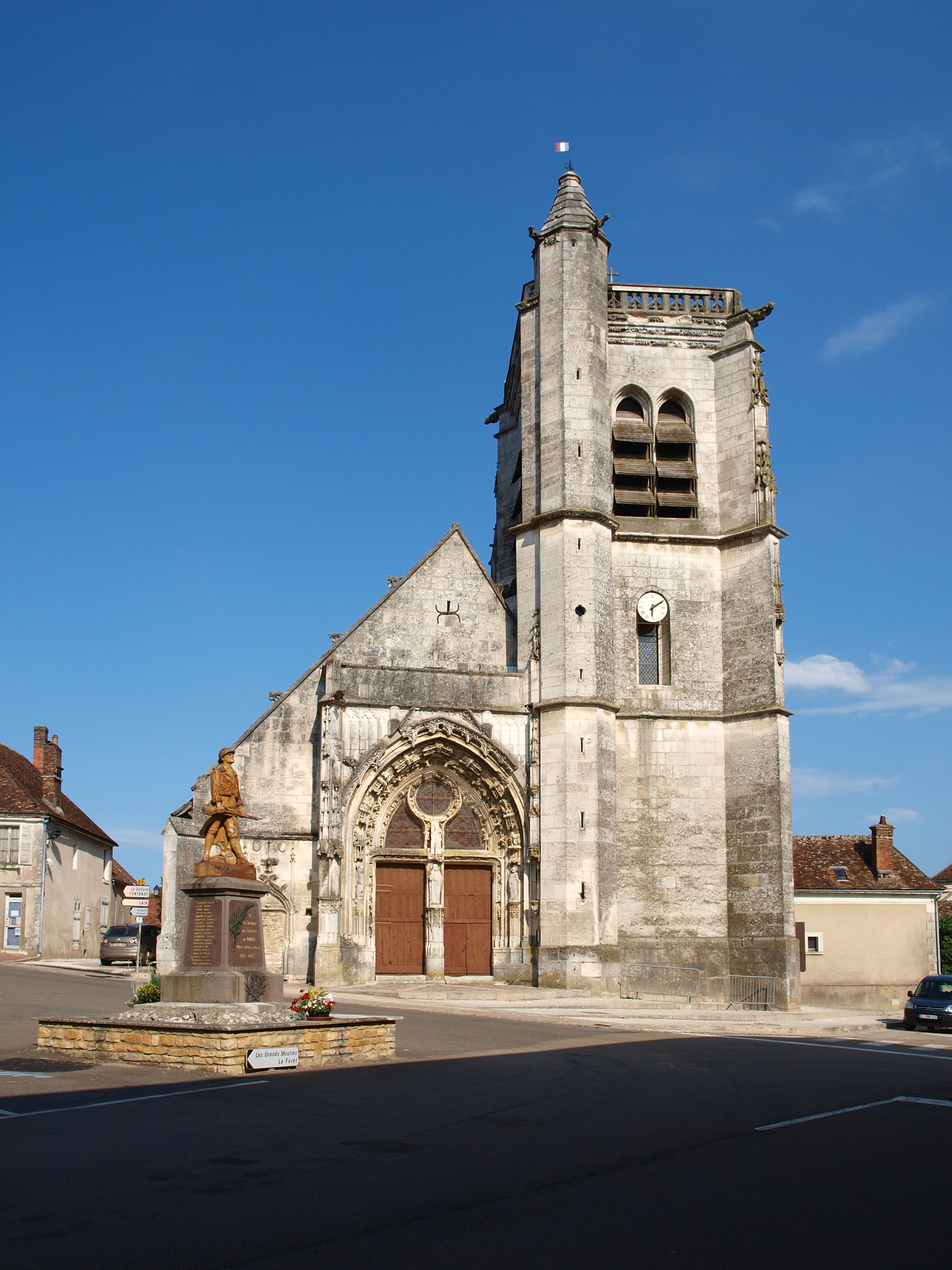 Thury (Yonne, France) ; église Saint-Julien.